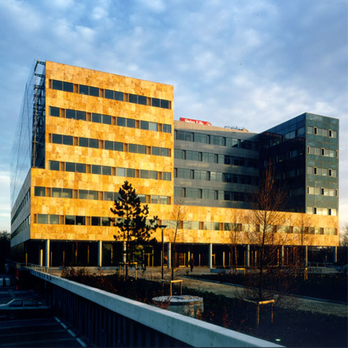 Description Hoofdkwartier van Zwitserleven in Amstelveen. In het publiek domein geplaatst door de auteur Hoofdkwartier van Zwitserleven in Amstelveen.